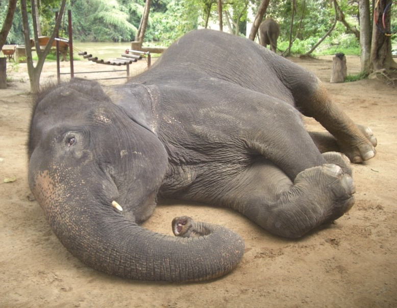 Лежачий азиатский слон. Таиланд.